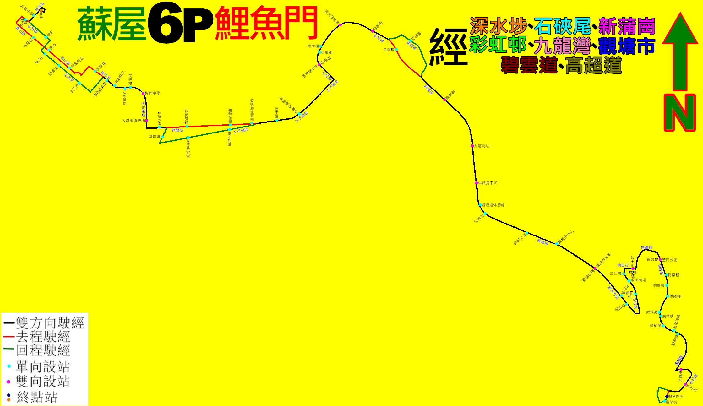 中文（香港）: 九龍巴士6P線的走線圖